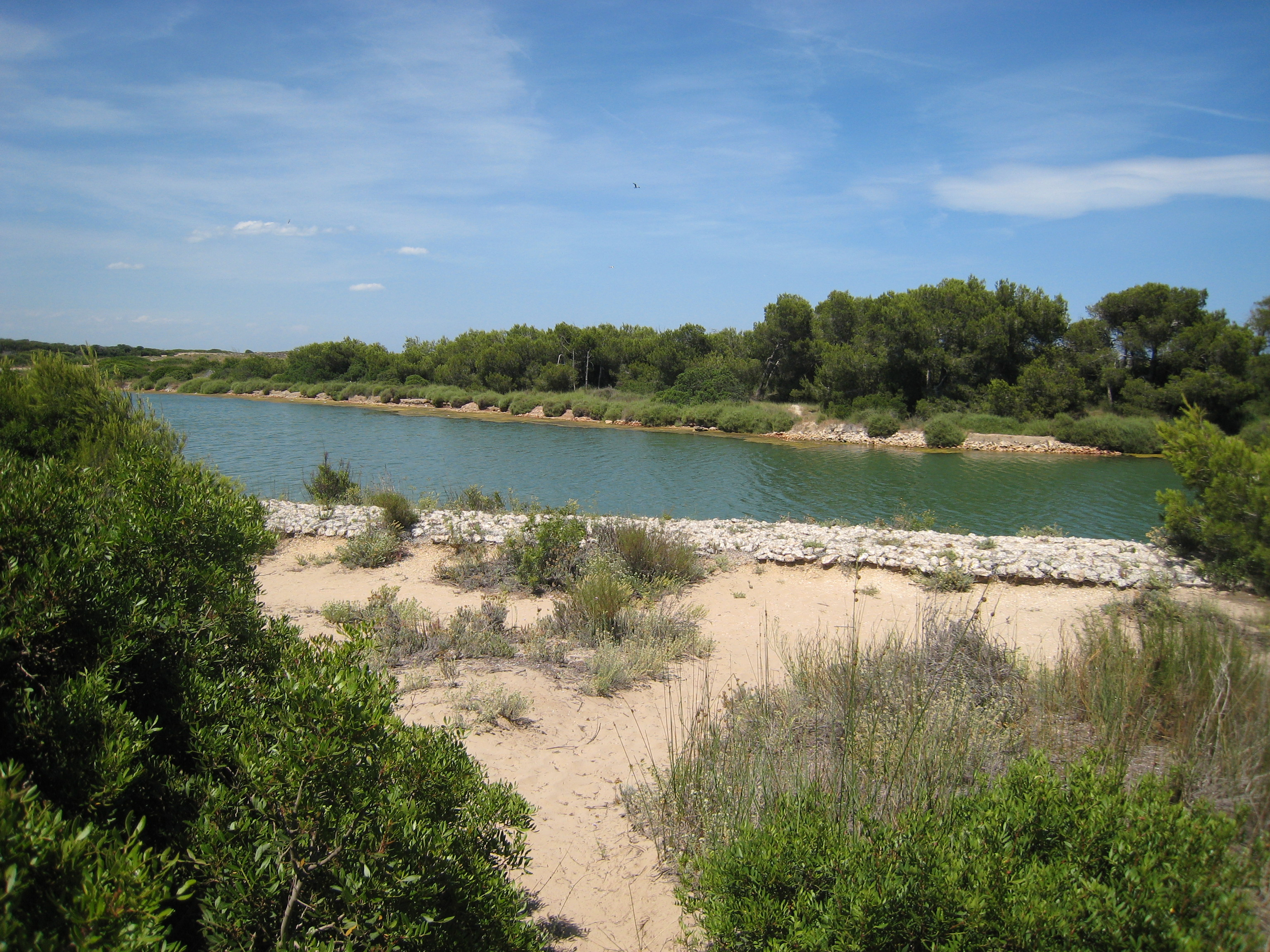 Non podía pasar por Valencia sen pasarme un rato pola Albufera, un dos meus ecosistemas favoritos (sí, téñoos), aínda que só fose para conectarme un rato dende a sombra dunha azinheira da qual ja nao sabía a idade.